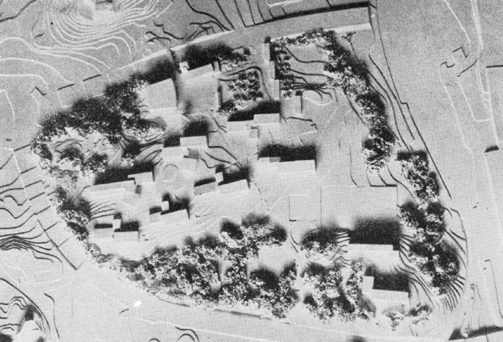 Ture Ryberg vinnande förslag "Per Haps", ny bebyggelse för Karolinska institutet i Solna. Solnavägen är upptill.